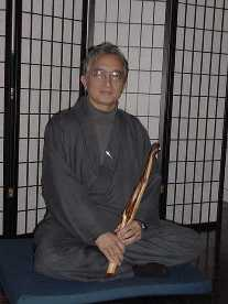 Ruben Habito